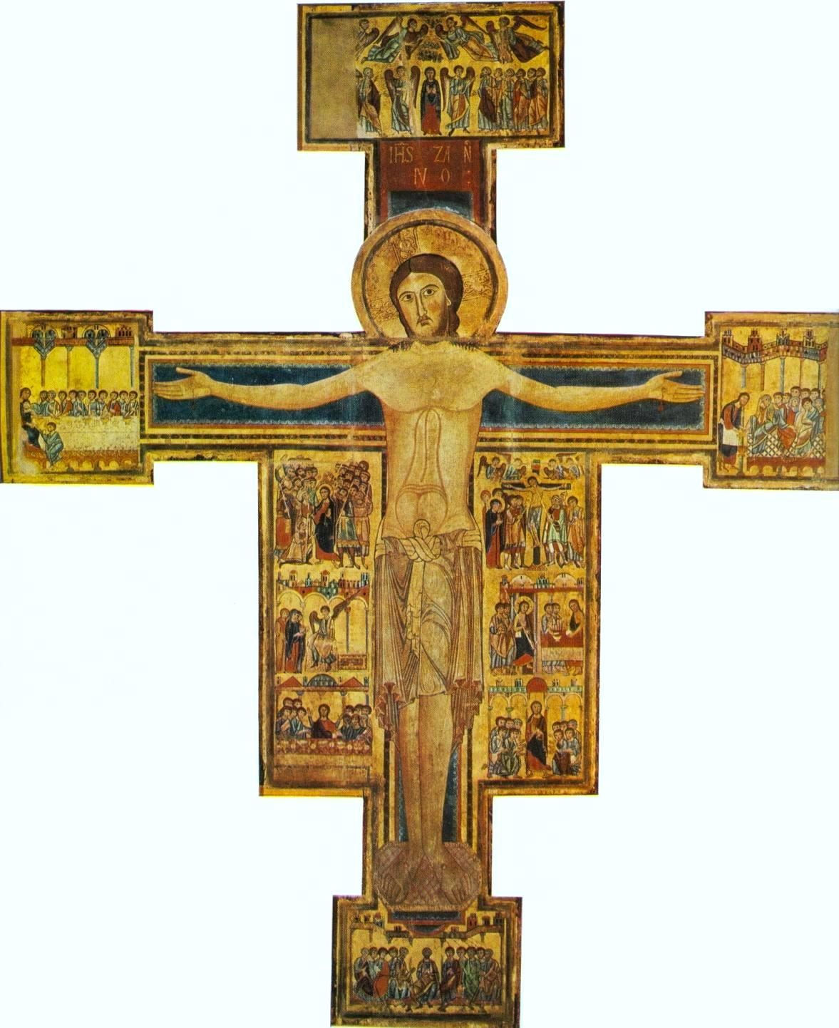 Croce della chiesa del santo sepolcro, pisa, 1150-1200 ca., museo di s. matteo